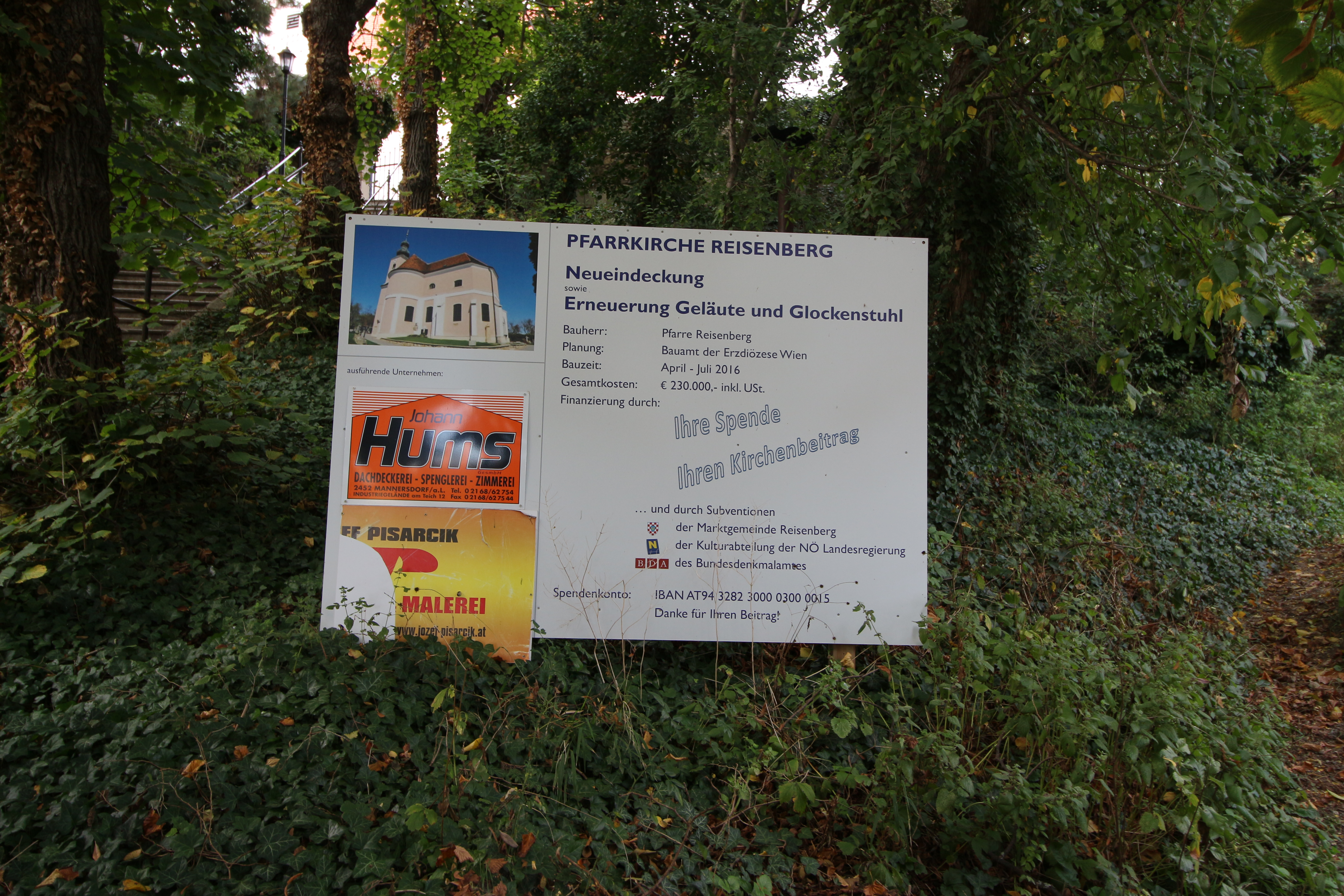 Kath. Pfarrkirche hl. Pankratius, Wehrmauer und Friedhof